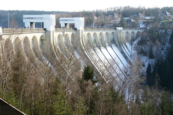 Weesertalspär